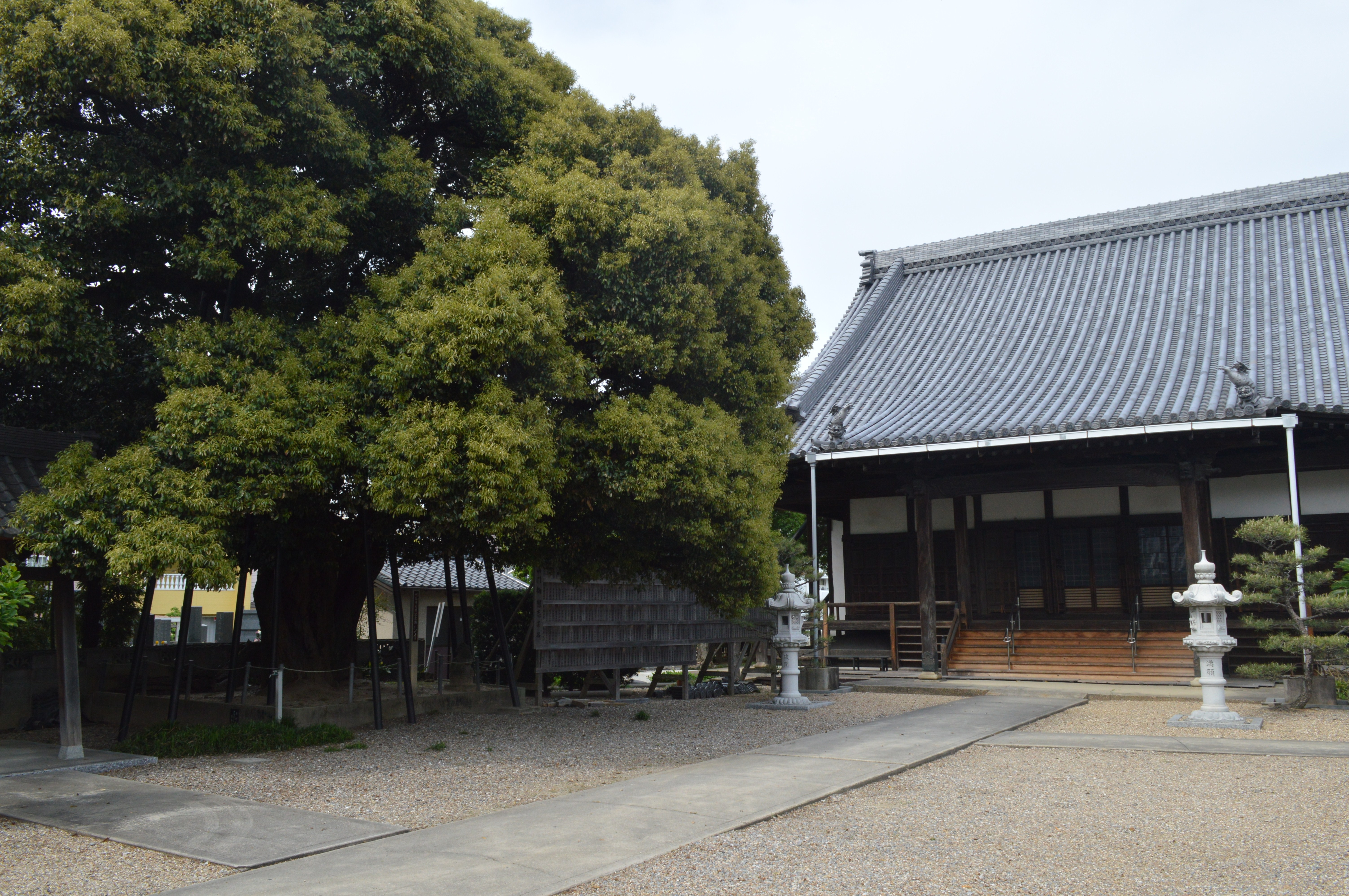 浄土真宗大谷派乗蓮寺、愛知県刈谷市。乗蓮寺の「シイ」は刈谷市指定天然記念物